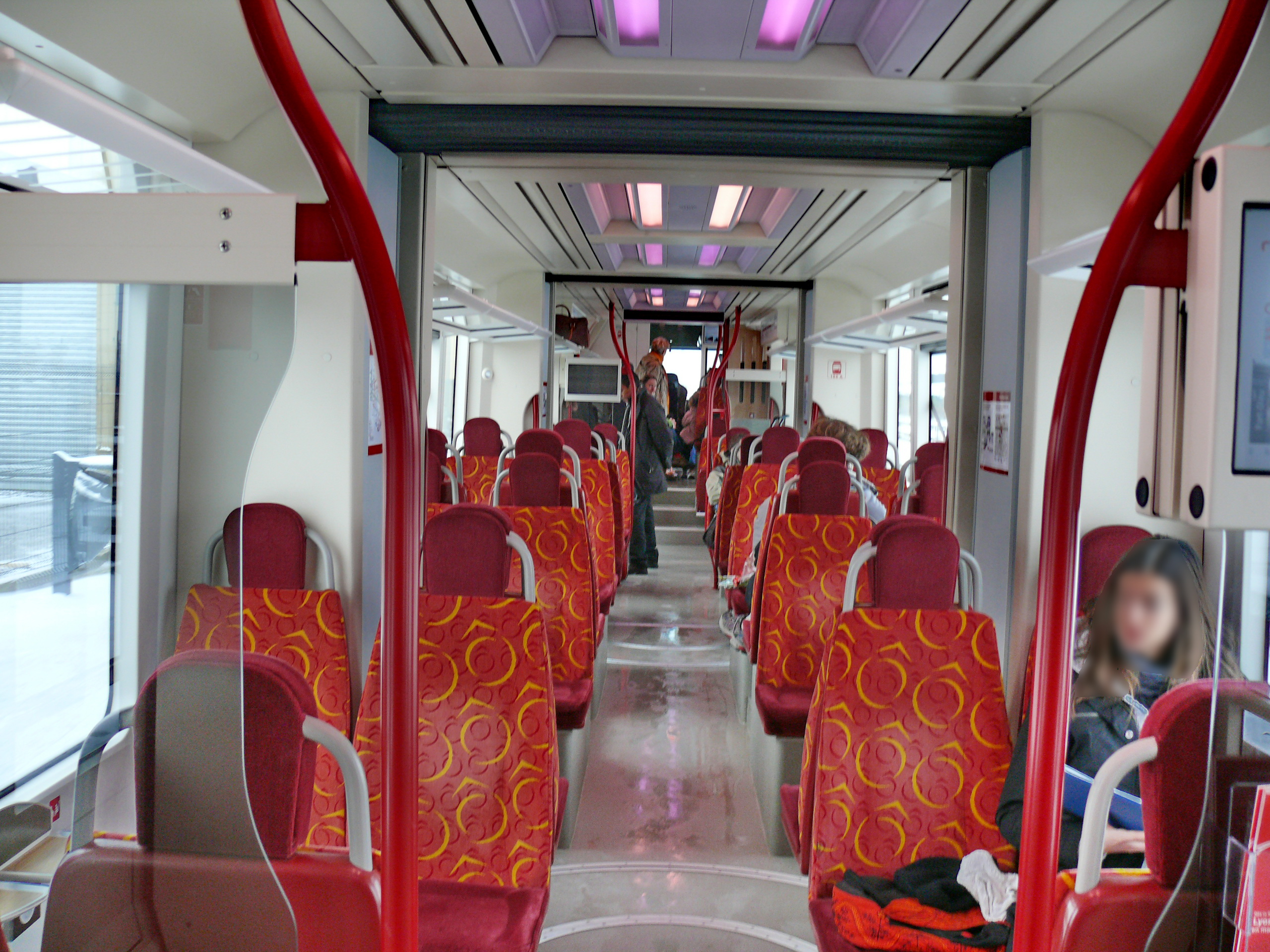 Rhônexpress : Aménagement intérieur d'une rame